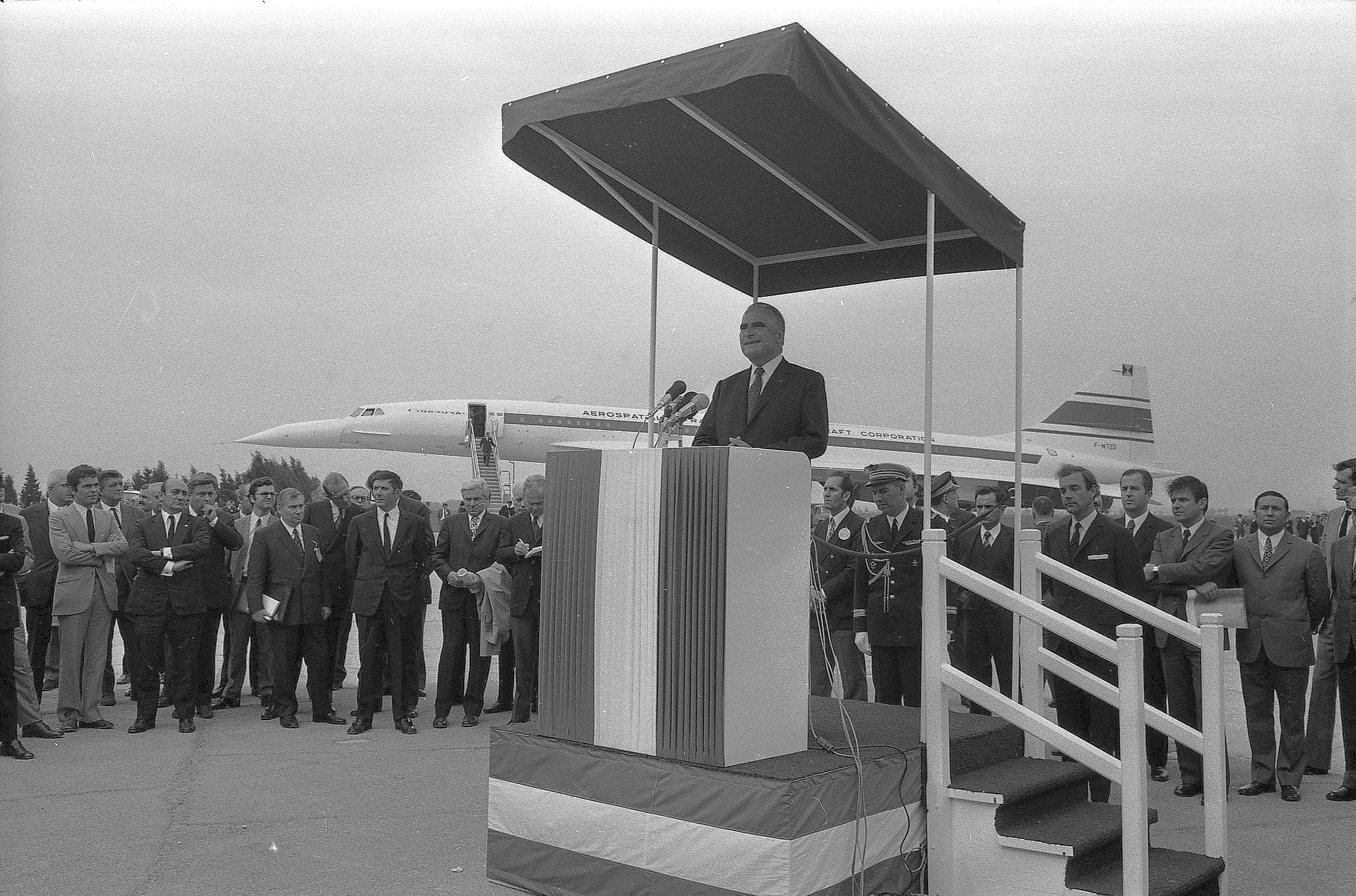 Aéroport de Toulouse-Blagnac. Le 7 Mai 1971. Vue de Georges Pompidou lors d'une conférence de presse sur le tarmac de l'aéroport.